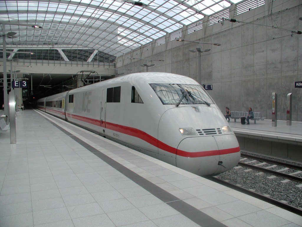 ICE2 (402 025-5) Köln-Bonn Airport